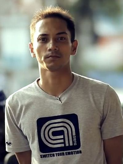 Meski mengakui dirinya masih 'begajulan', Fauzi memiliki komitmen yang kuat dalam membela Islam dan melawan pemikiran liberal, terutama melalui aktivitasnya di Twitter. Kontribusi dan semangatnya luar biasa, dan kerendahhatiannya pun perlu dicontoh oleh semua orang.